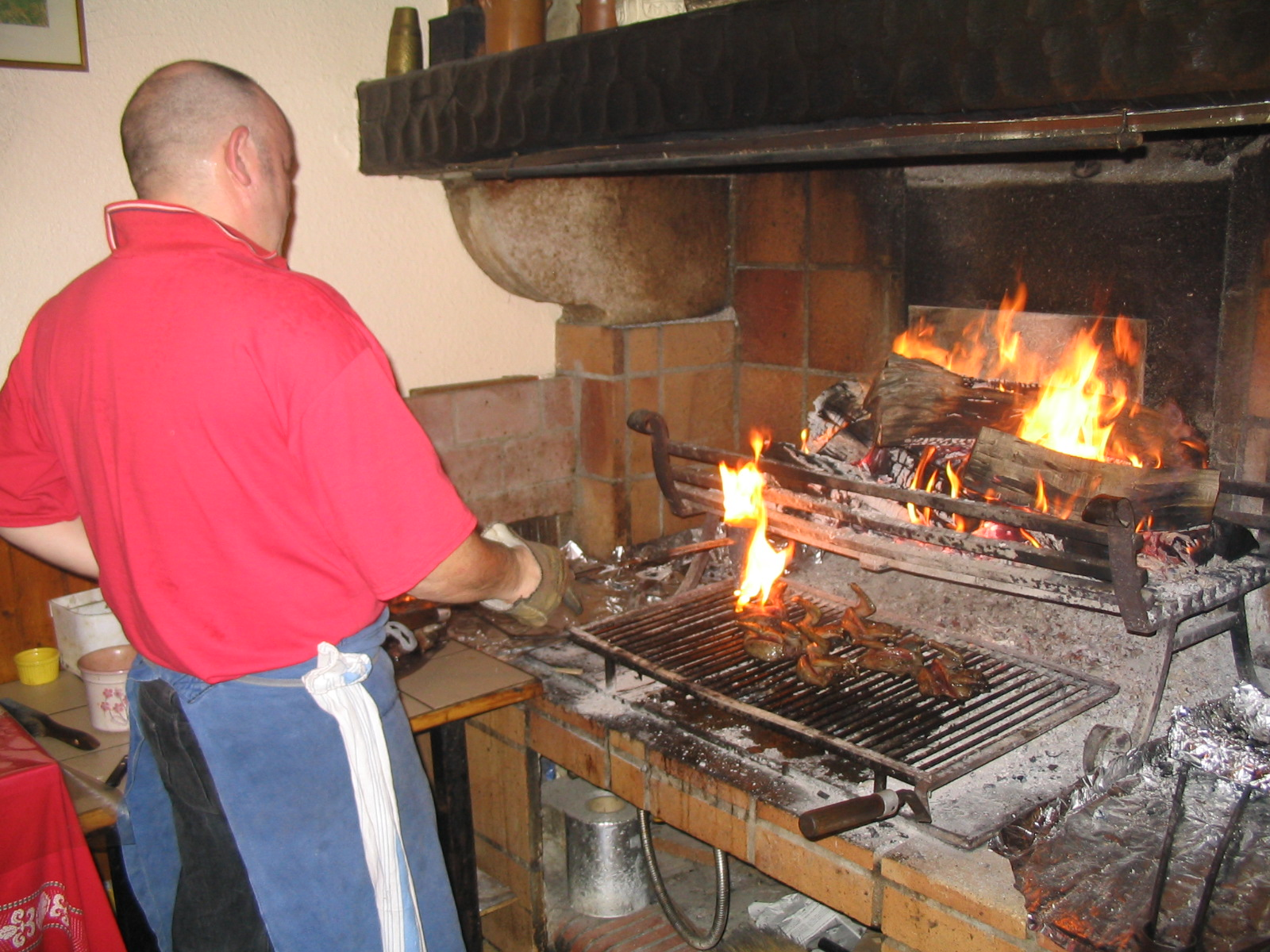 Palombes cuites à l'aide d'un "capucin" à Oloron-Sainte-Marie (Pyrénées-Atlantiques) (Pyrénées).